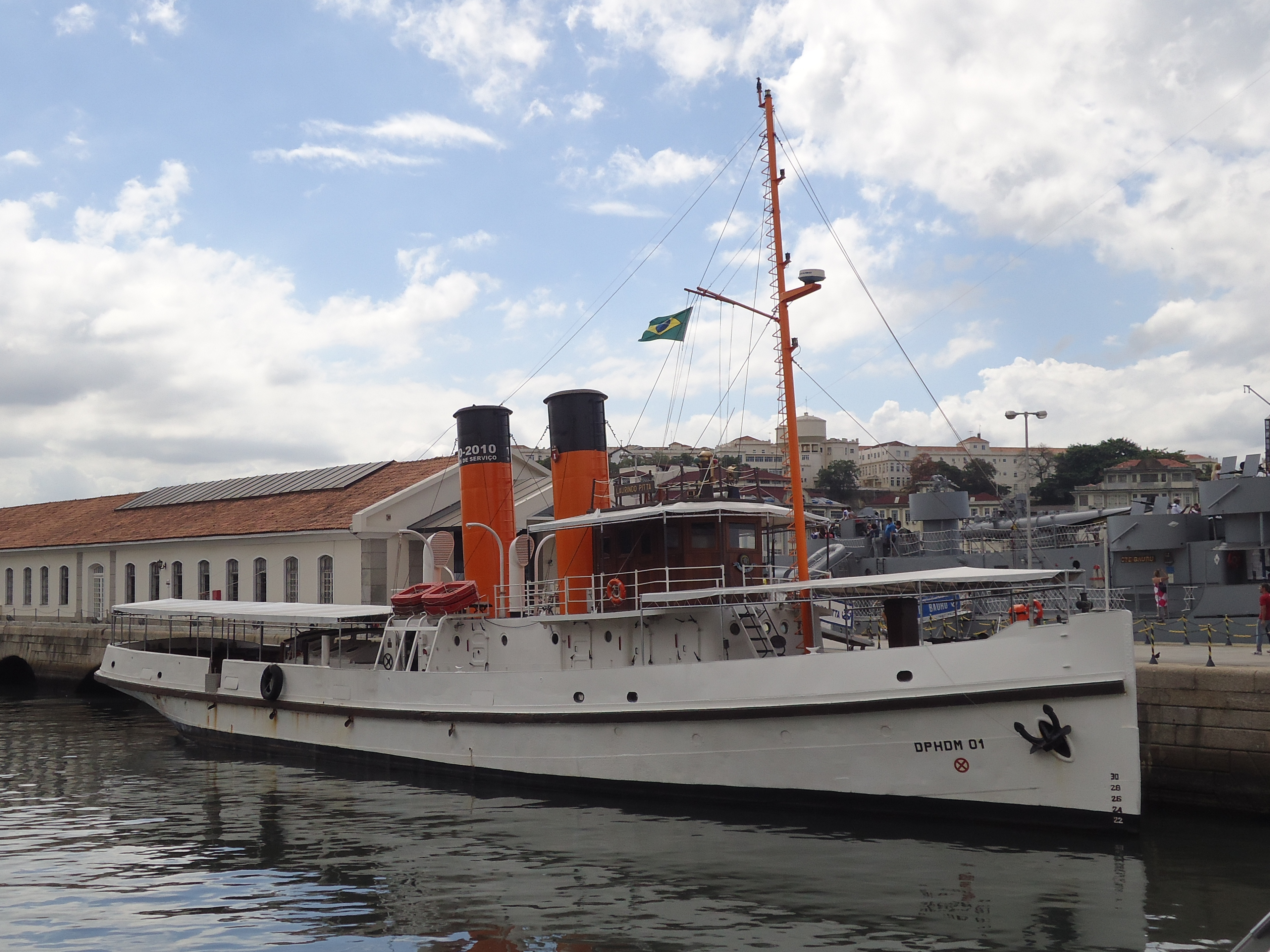 Espaço Cultural da Marinha, Rio de Janeiro, Brasil: rebocador "Laurindo Pitta".